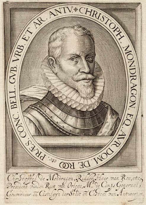 Cristóbal de Mondragón y Otalora/Christopher Mondragon/Christoffel Mondragon